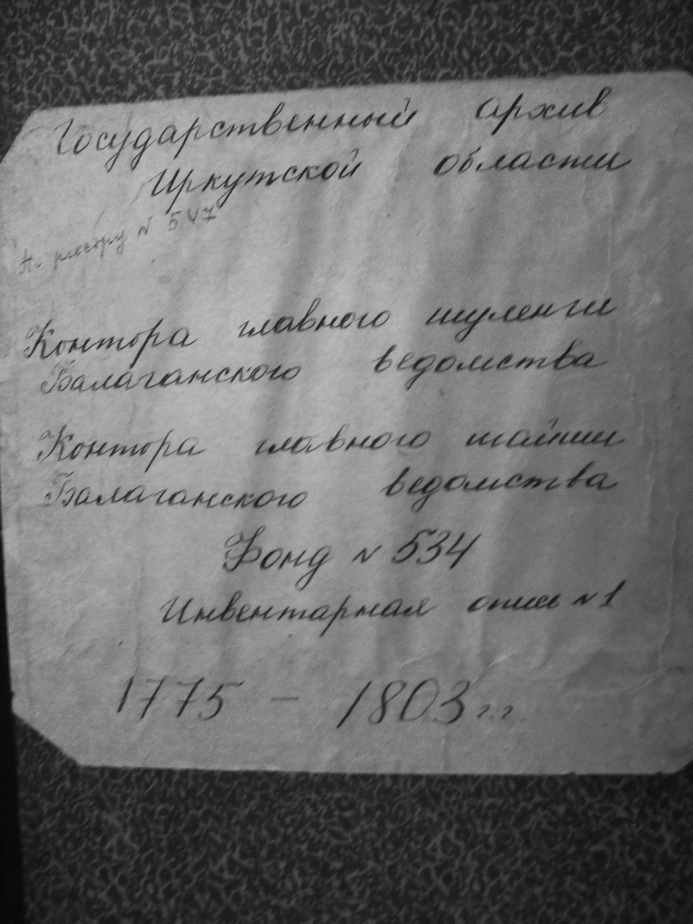 Контора главного шуленги Балаганского ведомства. Контора главного тайши Балаганского ведомства. 1775-1803 гг. Фонд №554. Государственный архив Иркутской области.